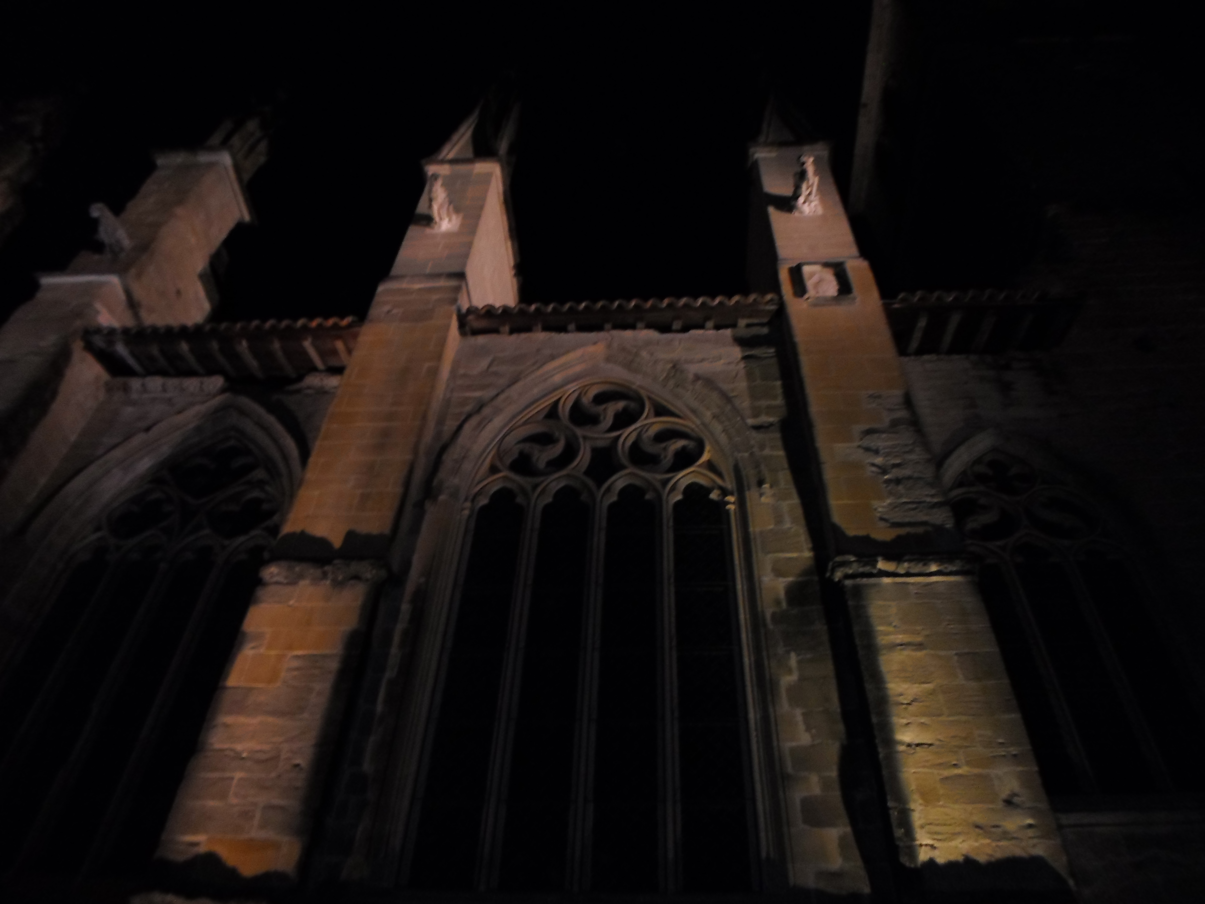 Église Notre-Dame de la Jayère Eglise Saint-Antoine-l'Abbaye by night 38160 PA38000020 VAN DEN HENDE ALAIN CC -BY-SA 4 0 050206 .